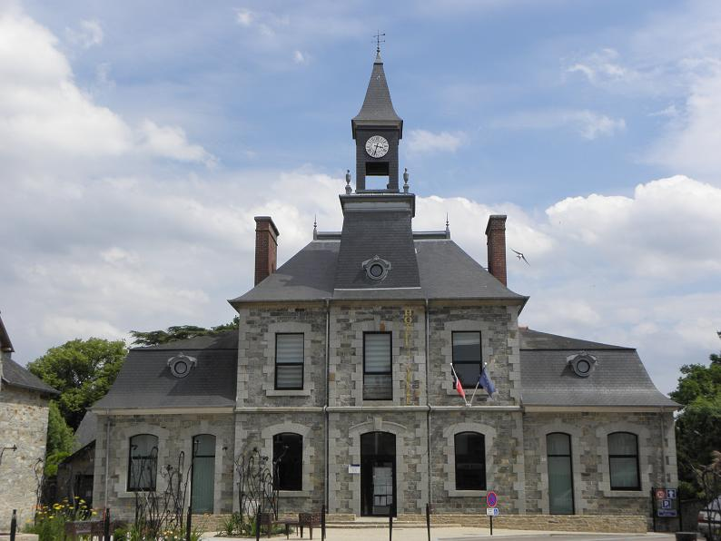 Mairie de Saint-Aubin-d'Aubigné (35).